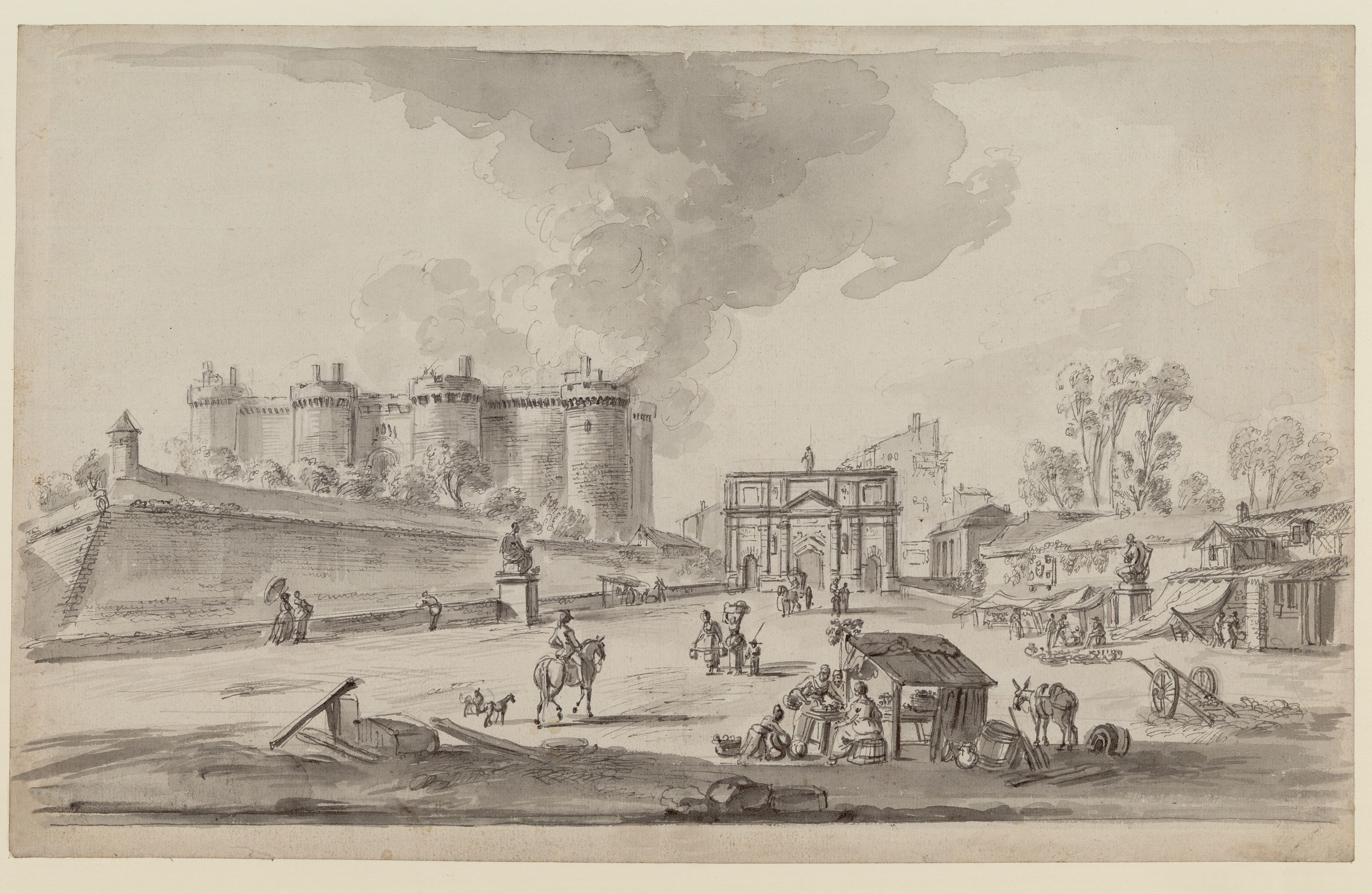 La Bastille et la porte Saint-Antoine - Dessin à la plume et lavis à l'encre de Chine, 22 x 37,5 cm.